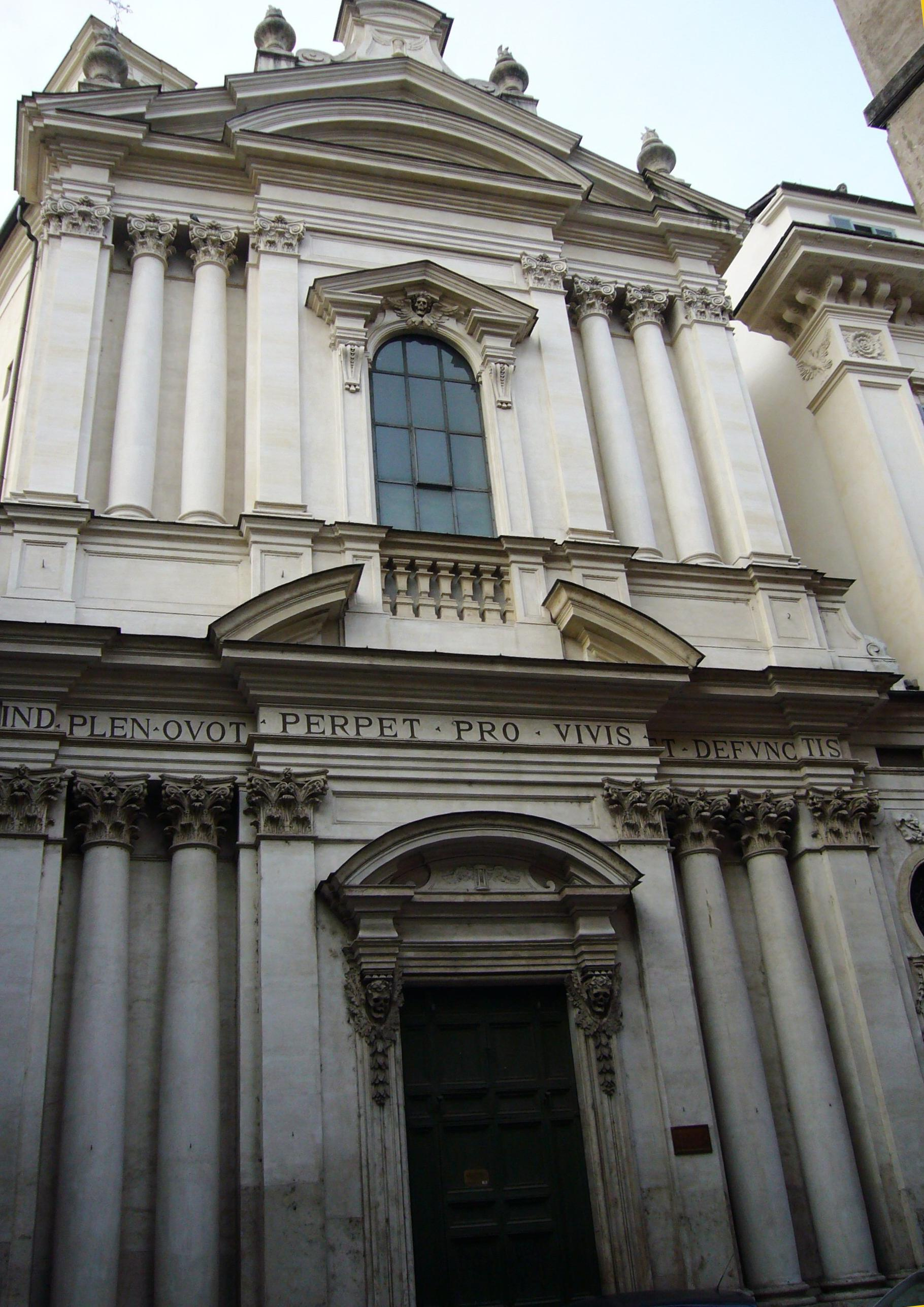 Roma, via Giulia: Santa Maria dell'Orazione e Morte (o del Suffragio)